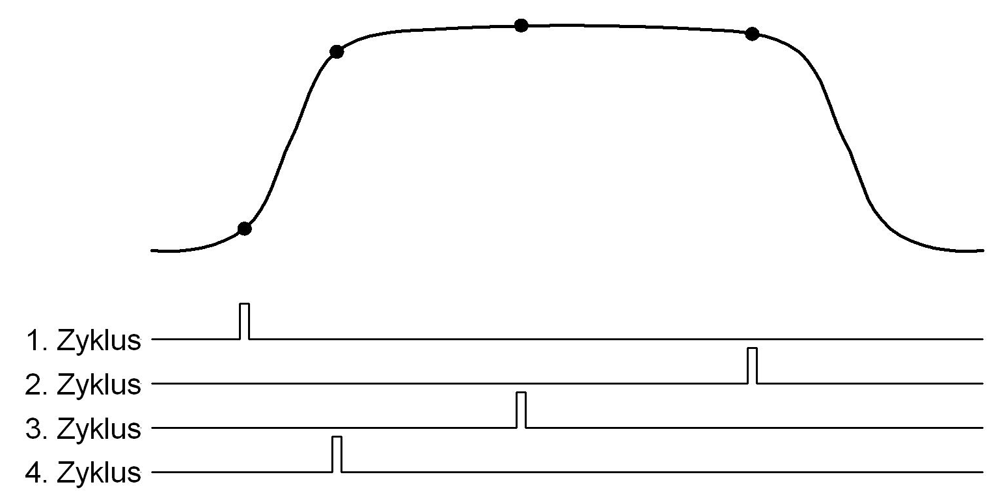 Äquivalenzzeitabtastung in einem Speicheroszilloskop